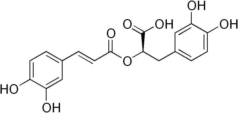 structure of rosmarinic acid